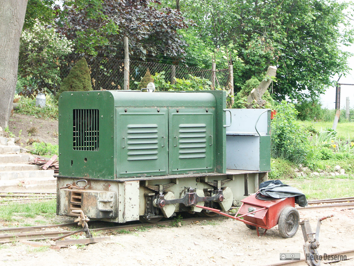 fb24img-010